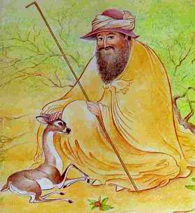 Chama al-Din Muhammad Hafiz (1325 - 1390), poeta lírico persa